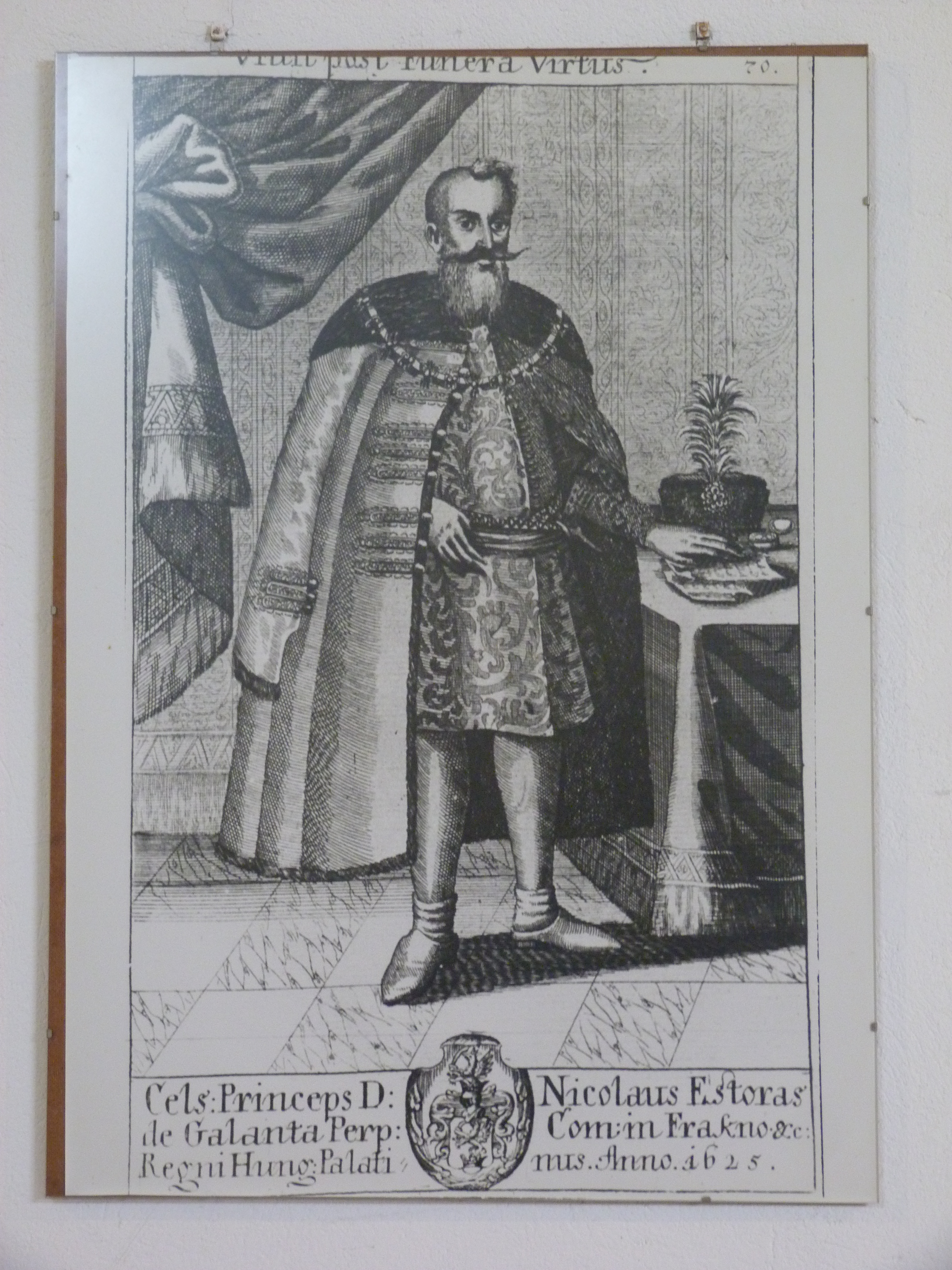 A felvétel 2014. december 4-én készült Boldogasszonyban. Kegytemplom, Kálvária, Benzinkút, Poszter. A hagyomány szerint II. András király uralkodása alatt a Fertő úgy kiöntött, hogy több falut elnyelt a víz. Ezek helyett alapítottak települést 1240-ben. 1324-ben "Zenmária" néven említik először. Területén már az ókorban település volt. Mosonszentandrás felé eső határrészén jelentős római településre utaló leletek kerültek elő. Mária kegyhelye már a 13. században ismert volt. Régi temploma a 14. században épült, ezt a török 1529-ben lerombolta. Mária-kegyképét 1661-ben hozták ide a Fraknói vár várkápolnájából, ahol az Eszterházyak tulajdonában volt. Az Eszterházy Pál által 1668-ban újjáépíttetett templomát és kolostorát 1683-ban a török ismét elpusztította. 1696 és 1702 között az olasz Francesco Martinelli tervei szerint bővítve építették újra fel. Régi híres búcsújáróhely. ©© Derzsi Elekes Andor, Budapest, 2014, Published in the Metapolisz DVD line. You are authorised to use this photo under Creative Commons – even for commercial, for profit purposes. The photo must be attributed to Derzsi Elekes Andor. All of the photos and vids in the Metapolisz DVD line are under Creative Commons and can be used even for commercial – for profit – purposes. Recommended Citation Derzsi Elekes Andor: Metapolisz DVD line